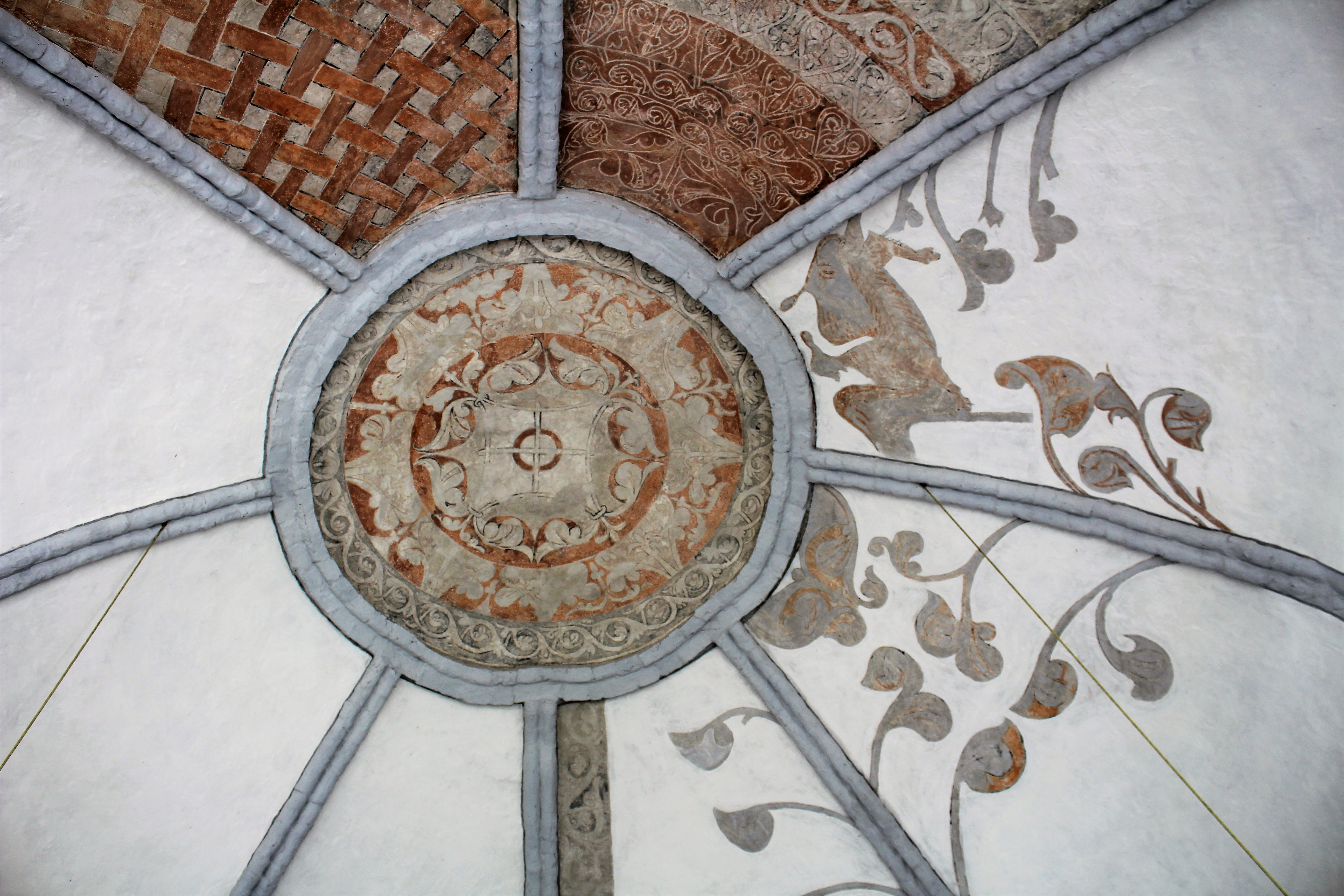 Ev.-reformierte Kirche Stapelmoor, Weener, Ostfriesland, Niedersachsen, Deutschland